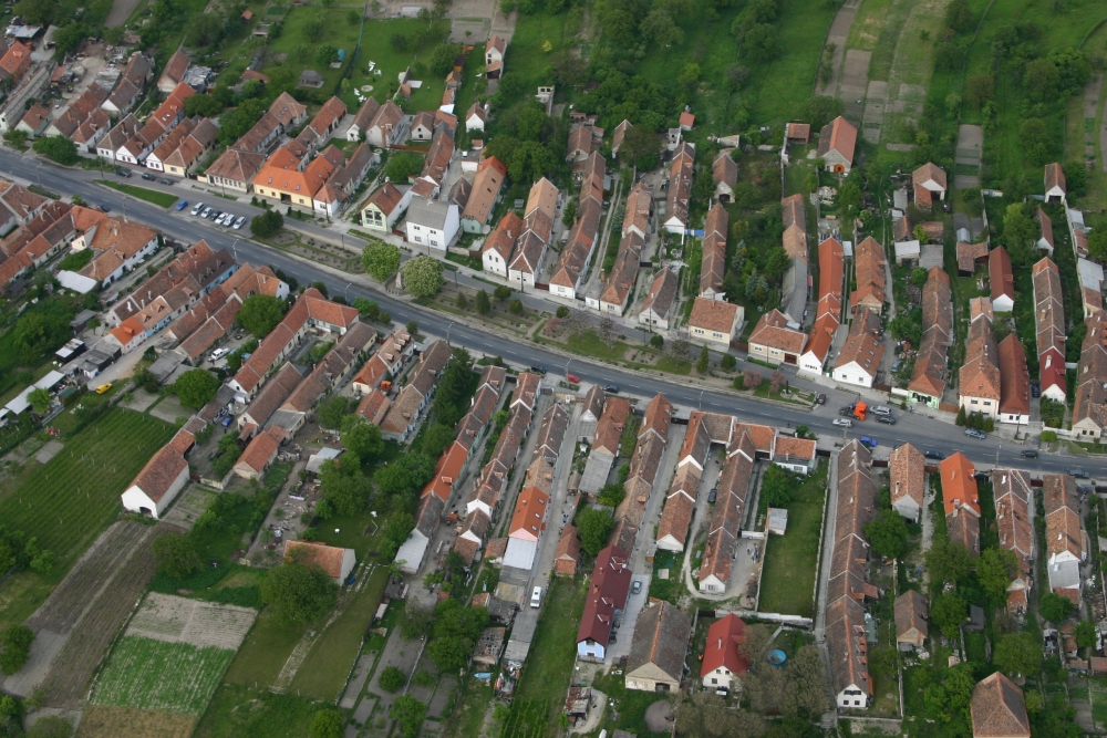 Fertőrákos, a jellegzetes hosszúházak (Győr-Moson-Sopron megye)